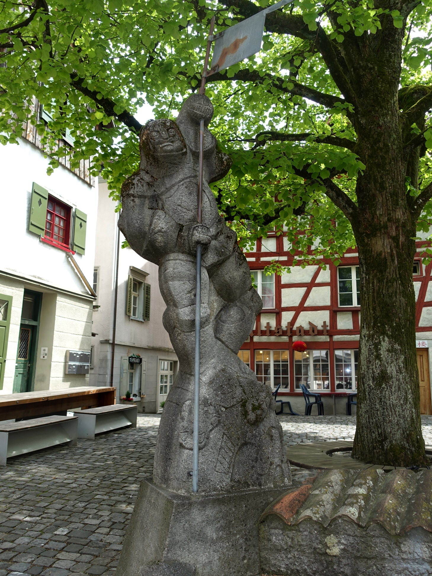 Werner Hilber (* 30. August 1900 in Will, St. Gallen; † 5. November 1989 in Kronbühl-Wittenbach) war ein Schweizer Bildhauer, Maler Musiker, Schreiber Philosoph und Lebenskünstler. Geburtshaus, Böckebrunnen, Bärenbrunnen